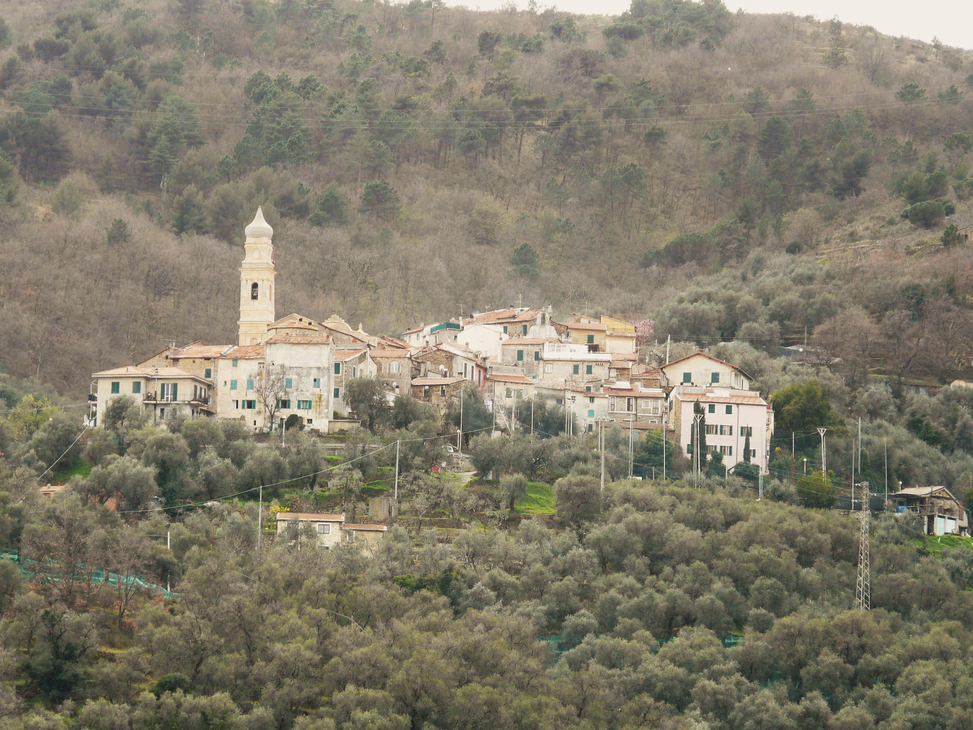 Boscomare, Pietrabruna, Liguria, Italia